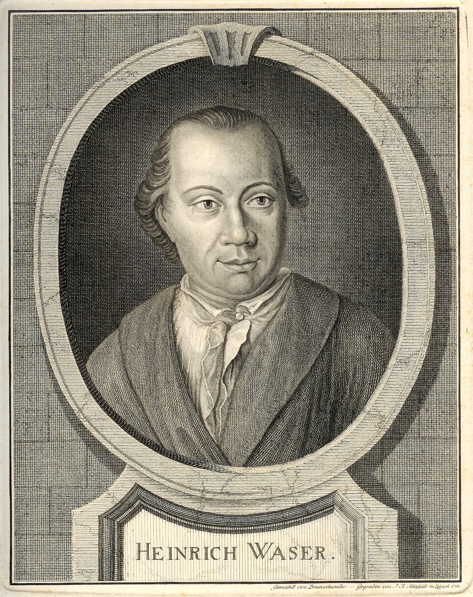 Johann Heinrich Waser, Zürich 1781